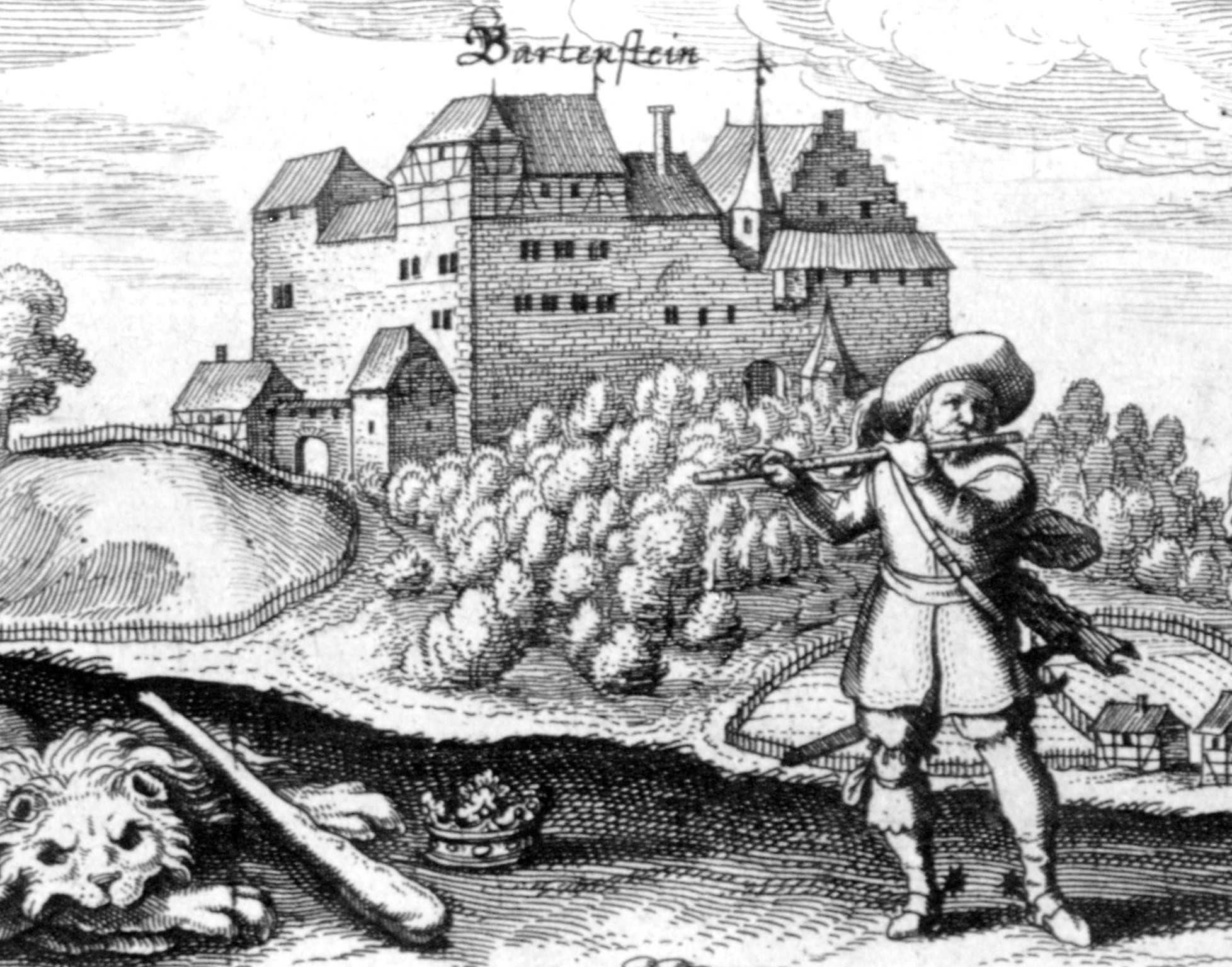 Die Vorgängerburg des späteren Schlosses Bartenstein in Bartenstein Teilort der Stadt Schrozberg im Landkreis Schwäbisch Hall in Baden-Würtemberg als Ausschnitt aus einem Emblem in Daniel Meissners Sammlung Schatzkästlein (Thesaurus Philopoliticus) Quinta Pars auf Seite 215 dargestellt.